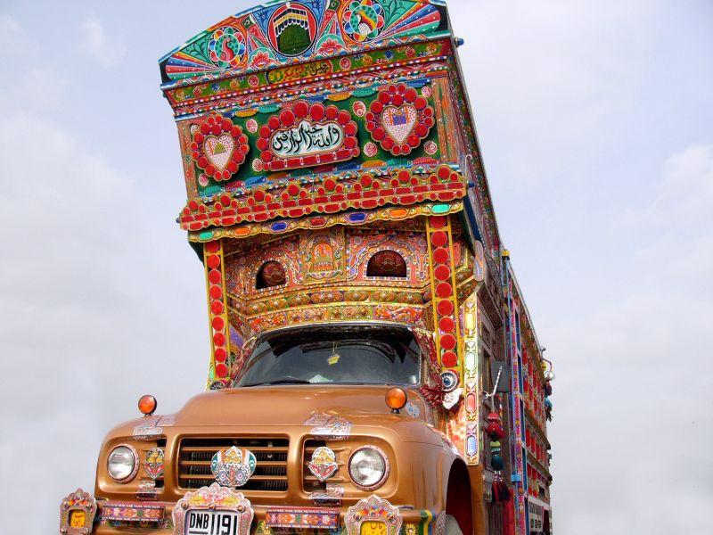 make up